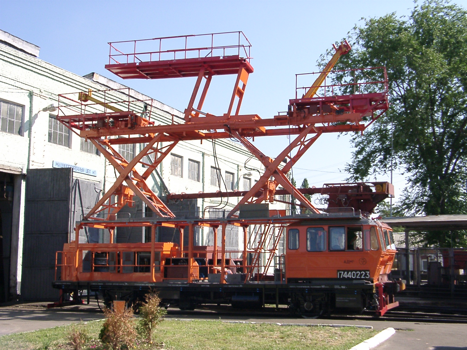 Монтажно-восстановительная автомотриса АДМс , производства ОАО Тихорецкий машиностроительный завод им. В.В. Воровского